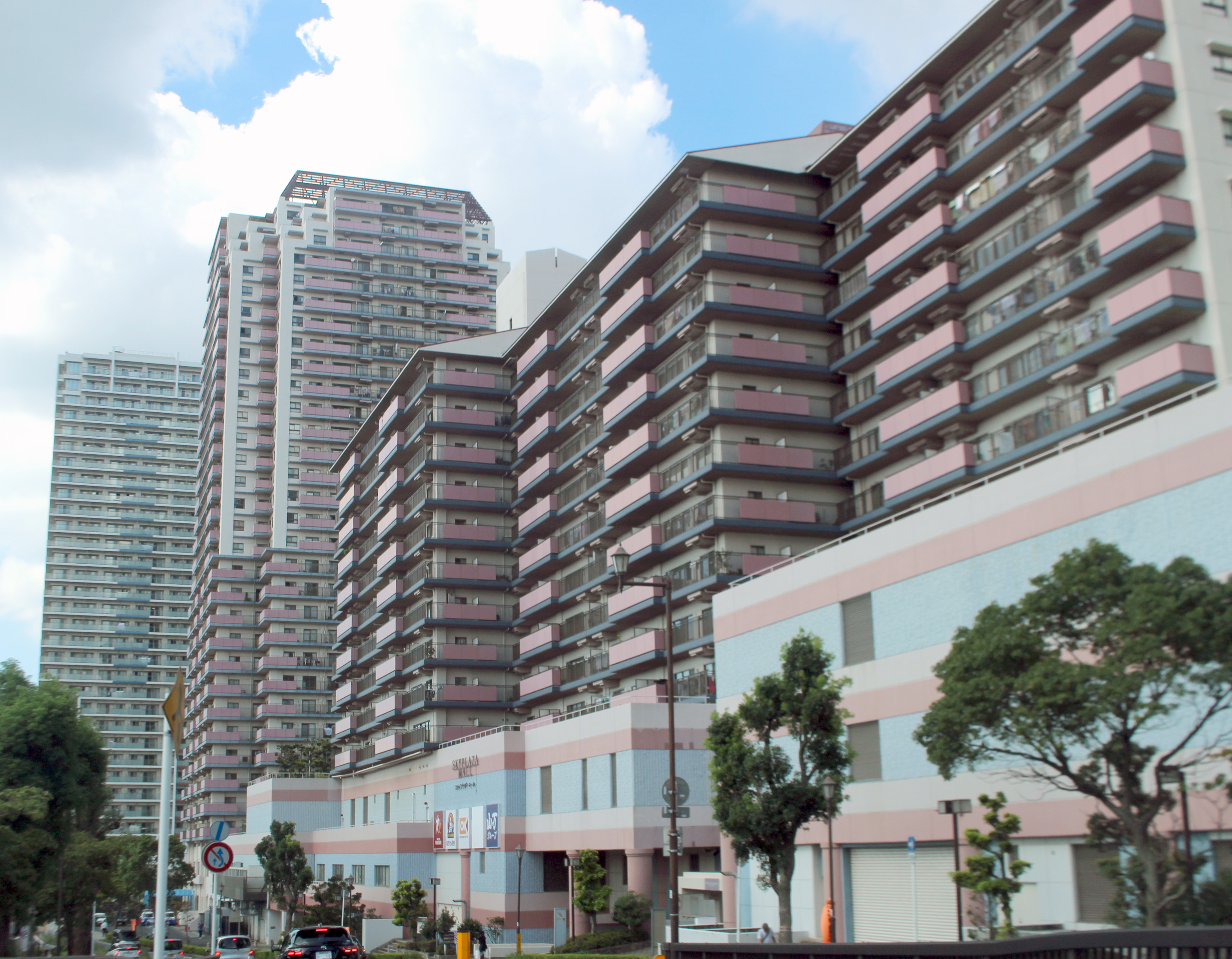 スカイプラザユーカリが丘センターハイツ（高層マンション）、1階がスカイプラザ・モール